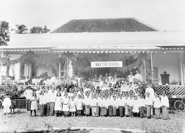 Foto. Pembukaan "Kartinischool" (Sekolah Kartini) pada tanggal 2 Mei 1915 di Bogor di rumah Jalan Panaragan 19.